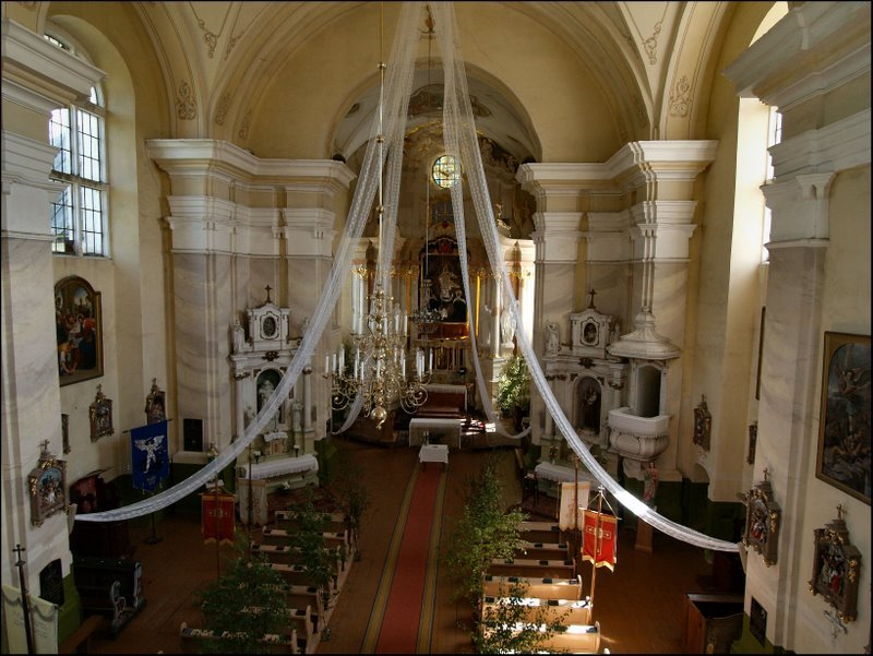 Kražių Švč. Mergelės Marijos Nekaltojo Prasidėjimo bažnyčia Autorius: Vytautas Vorobjovas. 2008.